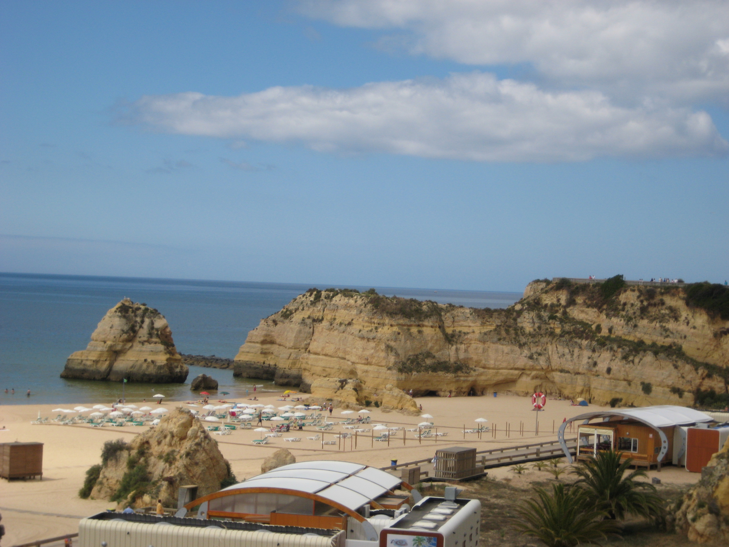 Praia da Rocha